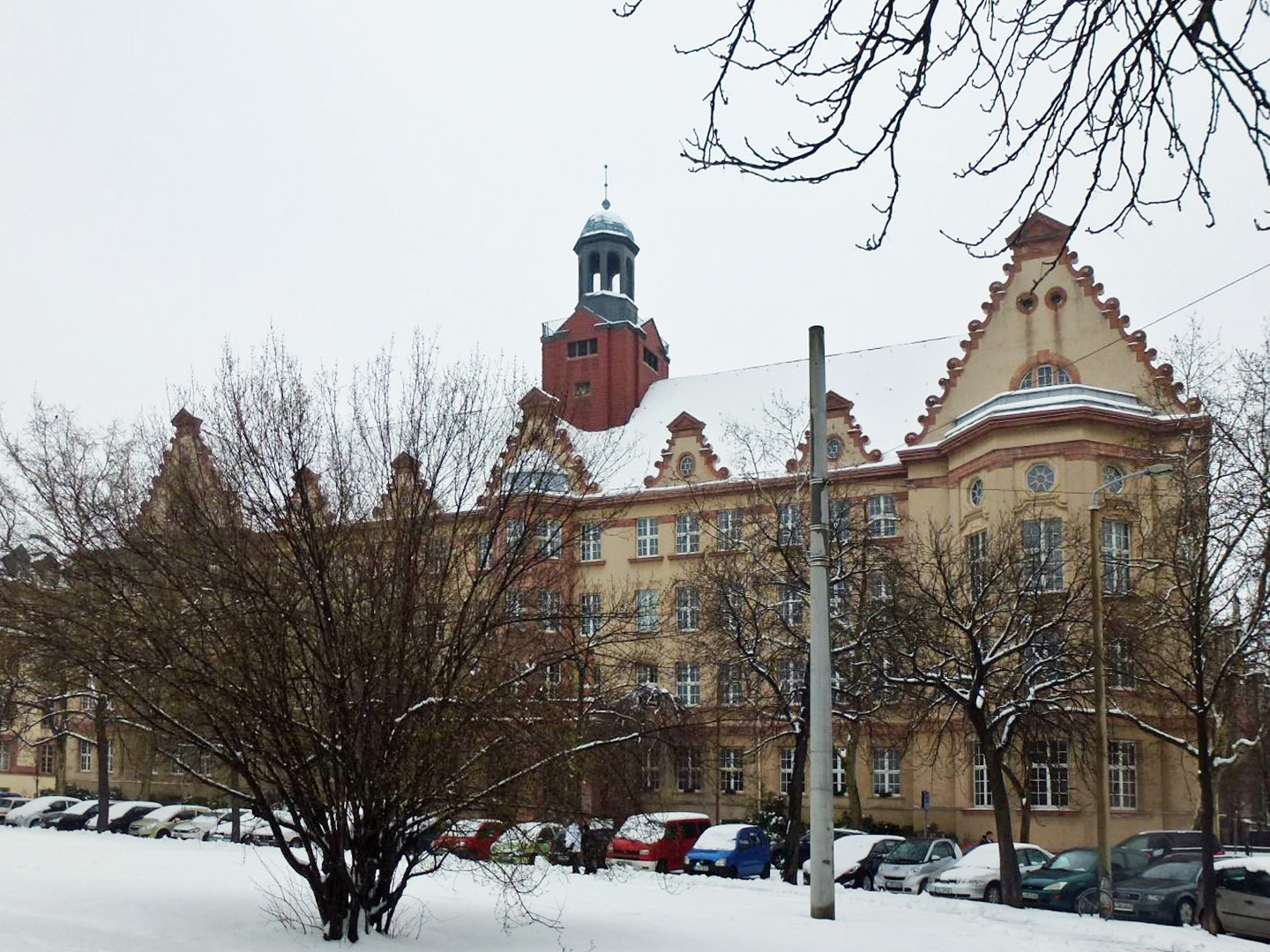 Leibnizschule in Leipzig